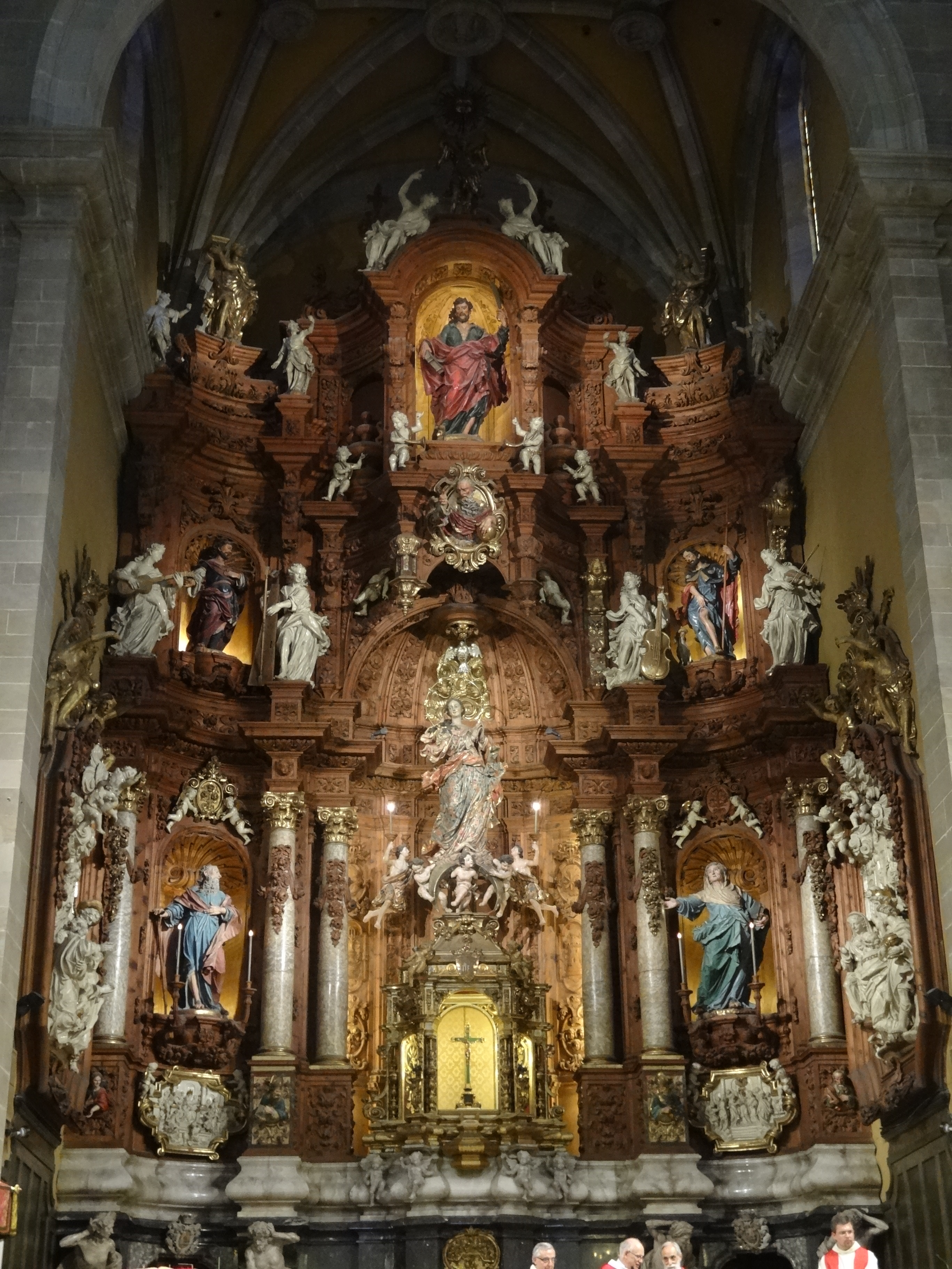 Basílica de Santa Maria, a Igualada. Retaule de l'altar major. Considerat la primera gran obra de l'art català realitzada després de la guerra de successió. L'estètica barroca del projecte inicial fou compensada per un cert classicisme en l'execució final.